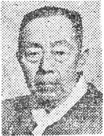 한국의 독립운동가 겸 정치인, 임시정부 부주석 우사 김규식, 1947년 국내에서 촬영한 반명함판 사진